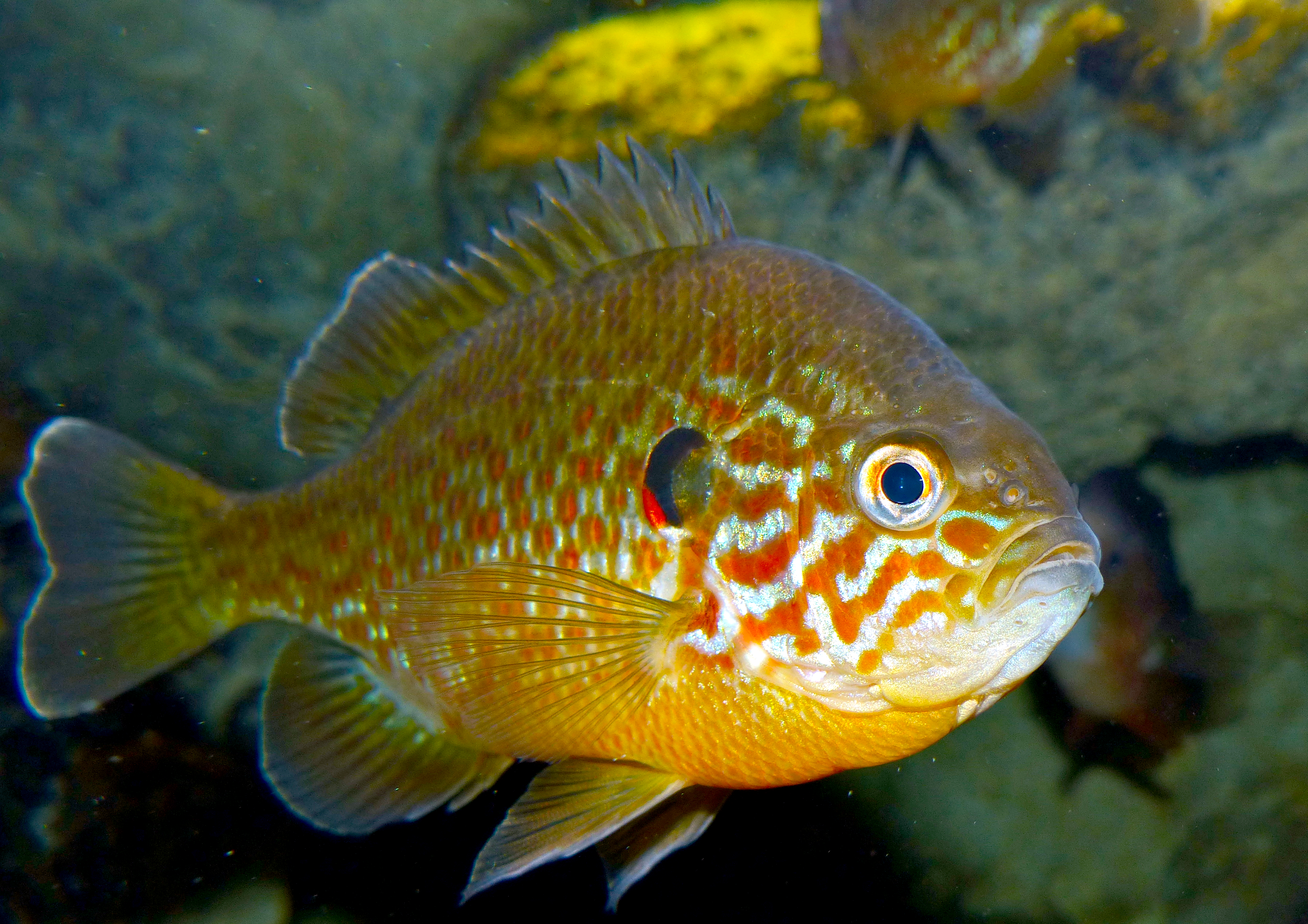 Aquarium du Val-de-Loire, Lussault-sur-Loire, Indre-et-Loire, FRANCE